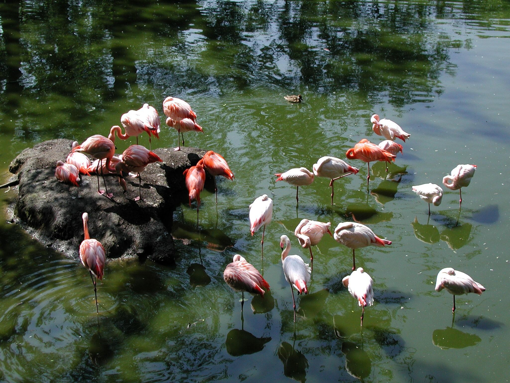 Flamingo, trichromatisches Bild